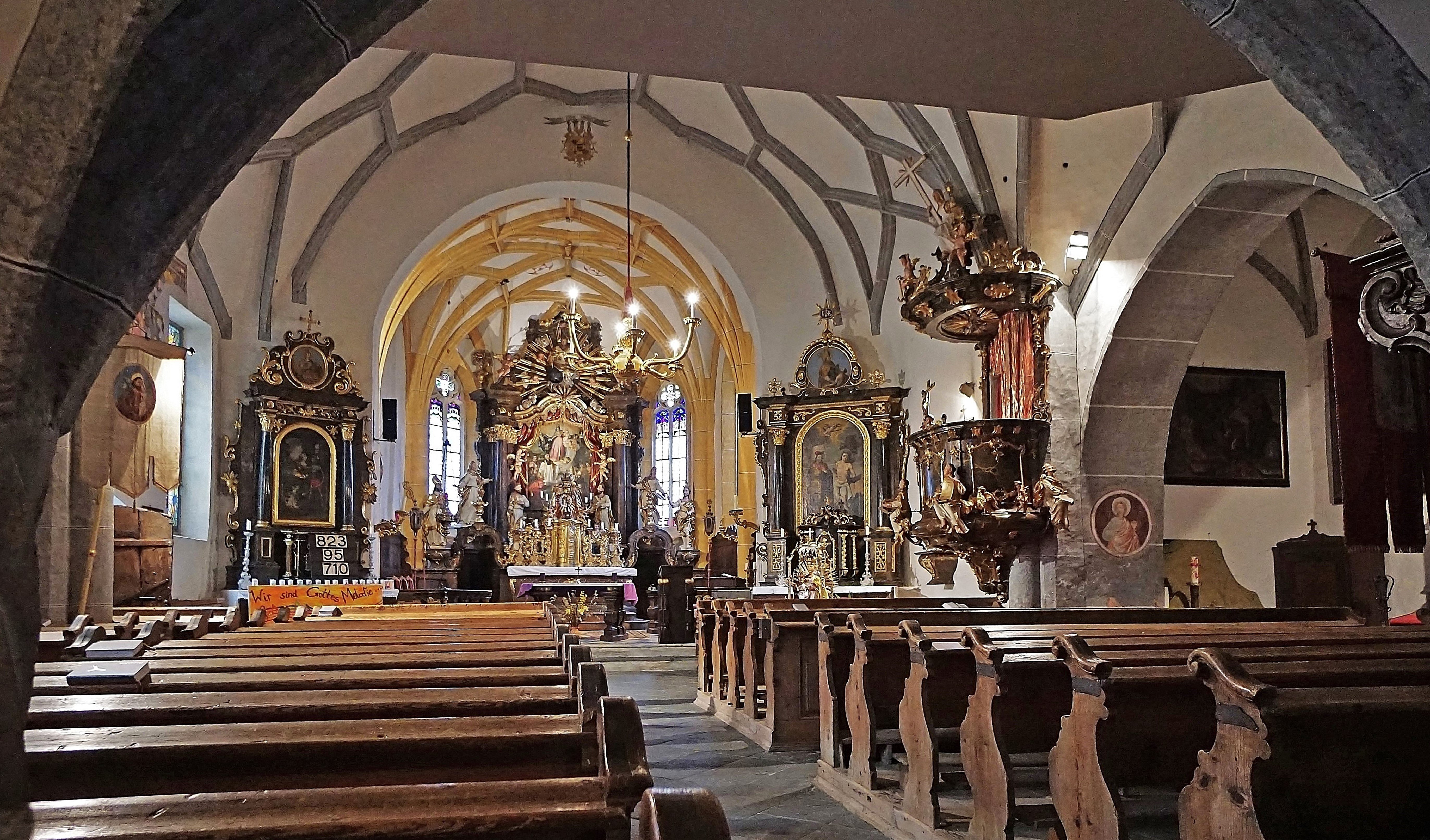 Kath. Pfarrkirche Maria Pulst, Innenansicht